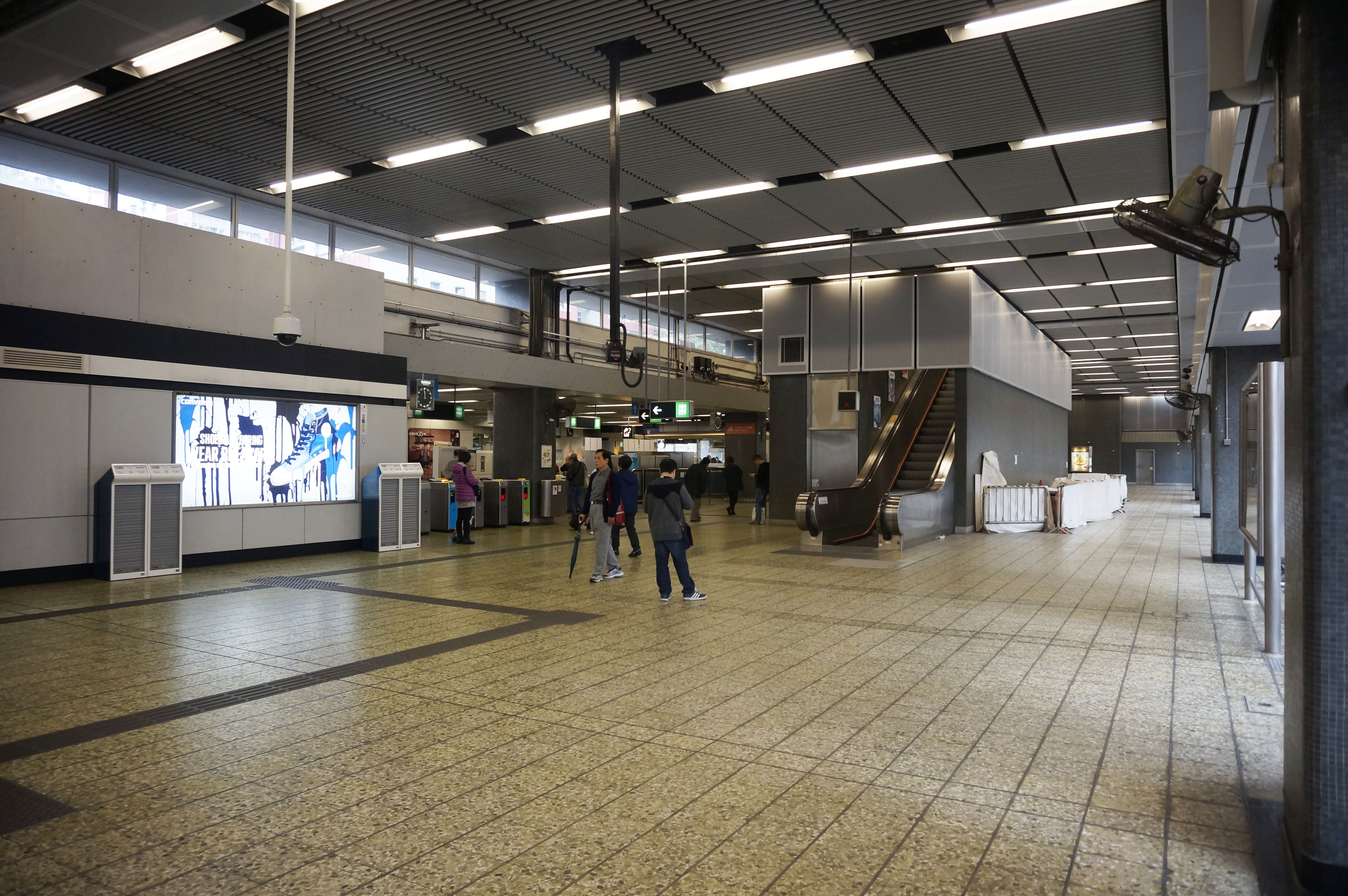 港鐵牛頭角站大堂